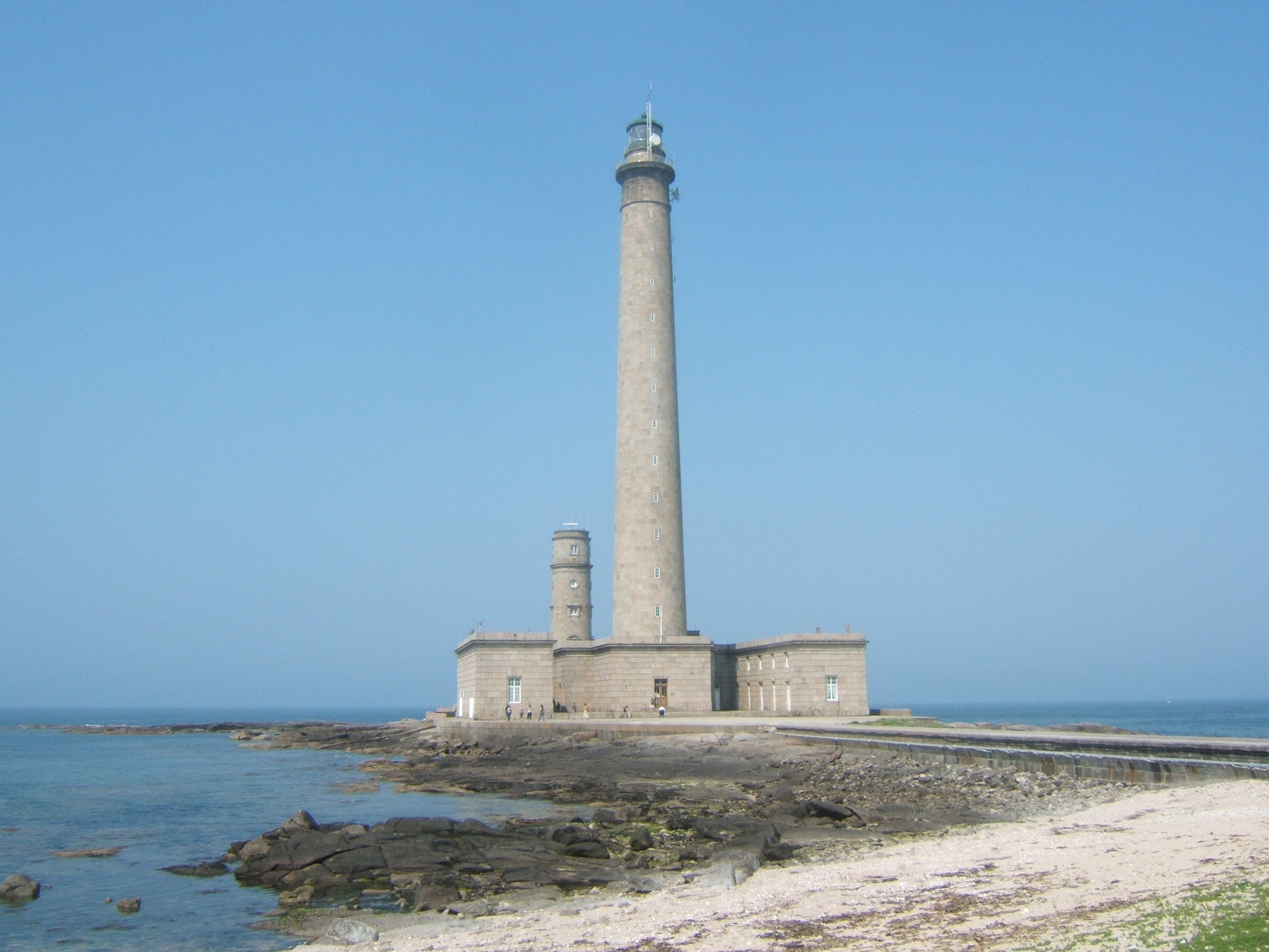 Le phare de Gatteville dans le Cotentin.